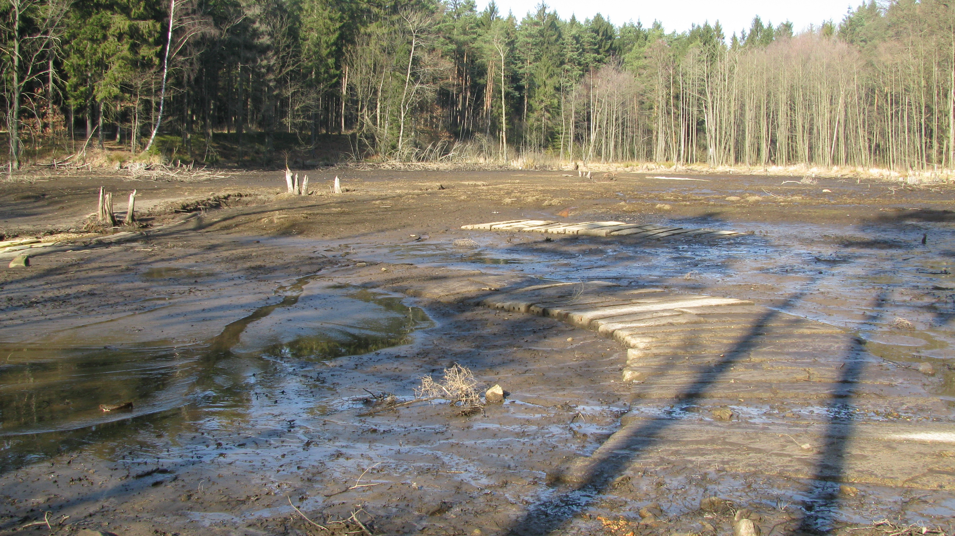 Der Plattenwegin den Popeldammteich wird bei abgelassenem Wasser sichtbar.